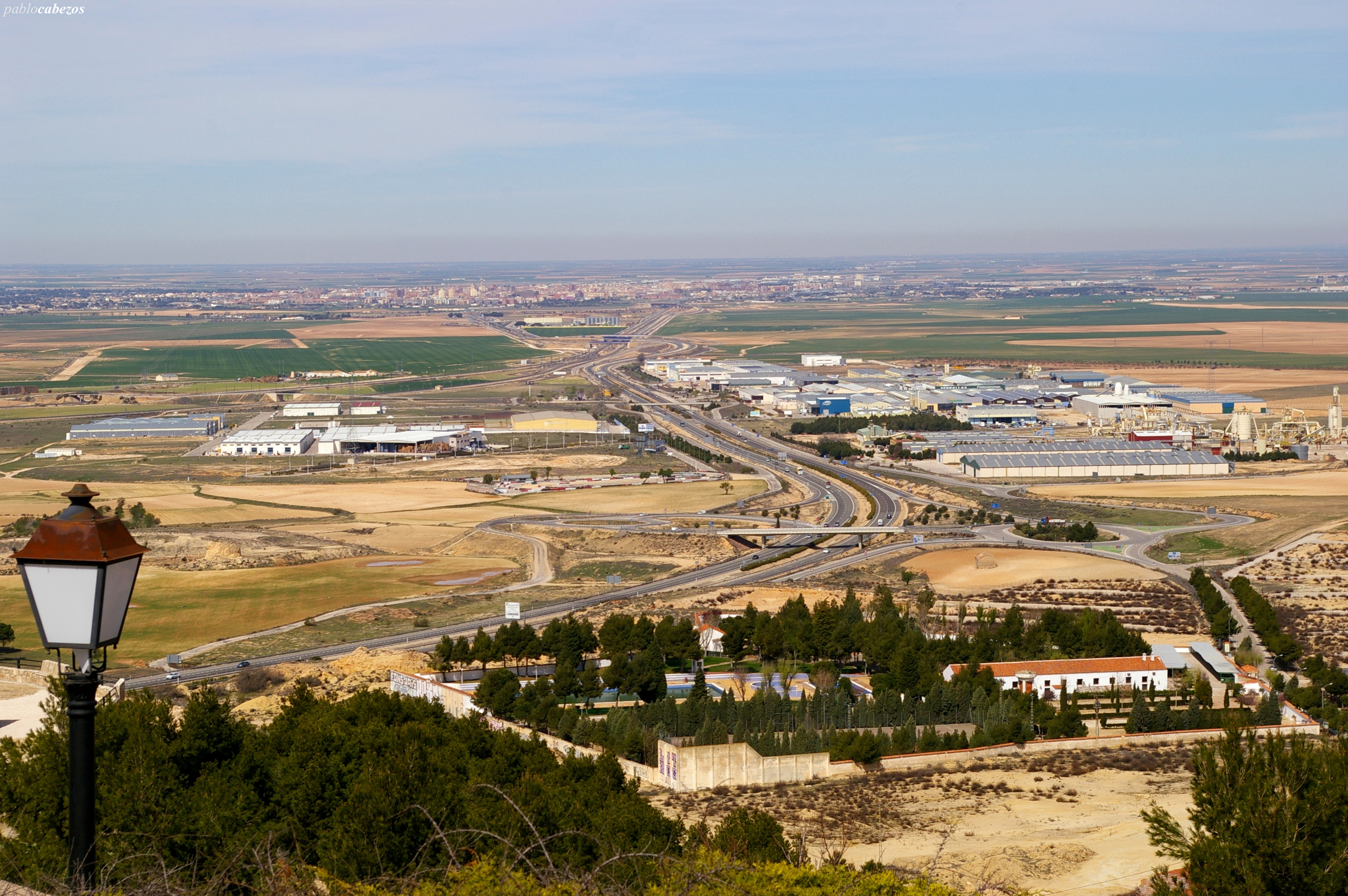 Las dos poblaciones están separadas por 15 km. La posición estrategica de Chinchilla permite tener una gran vista de la llanura manchega. Chinchilla fue la capital de la región hasta la creación de las actuales provincias por Javier de Burgos en 1833.